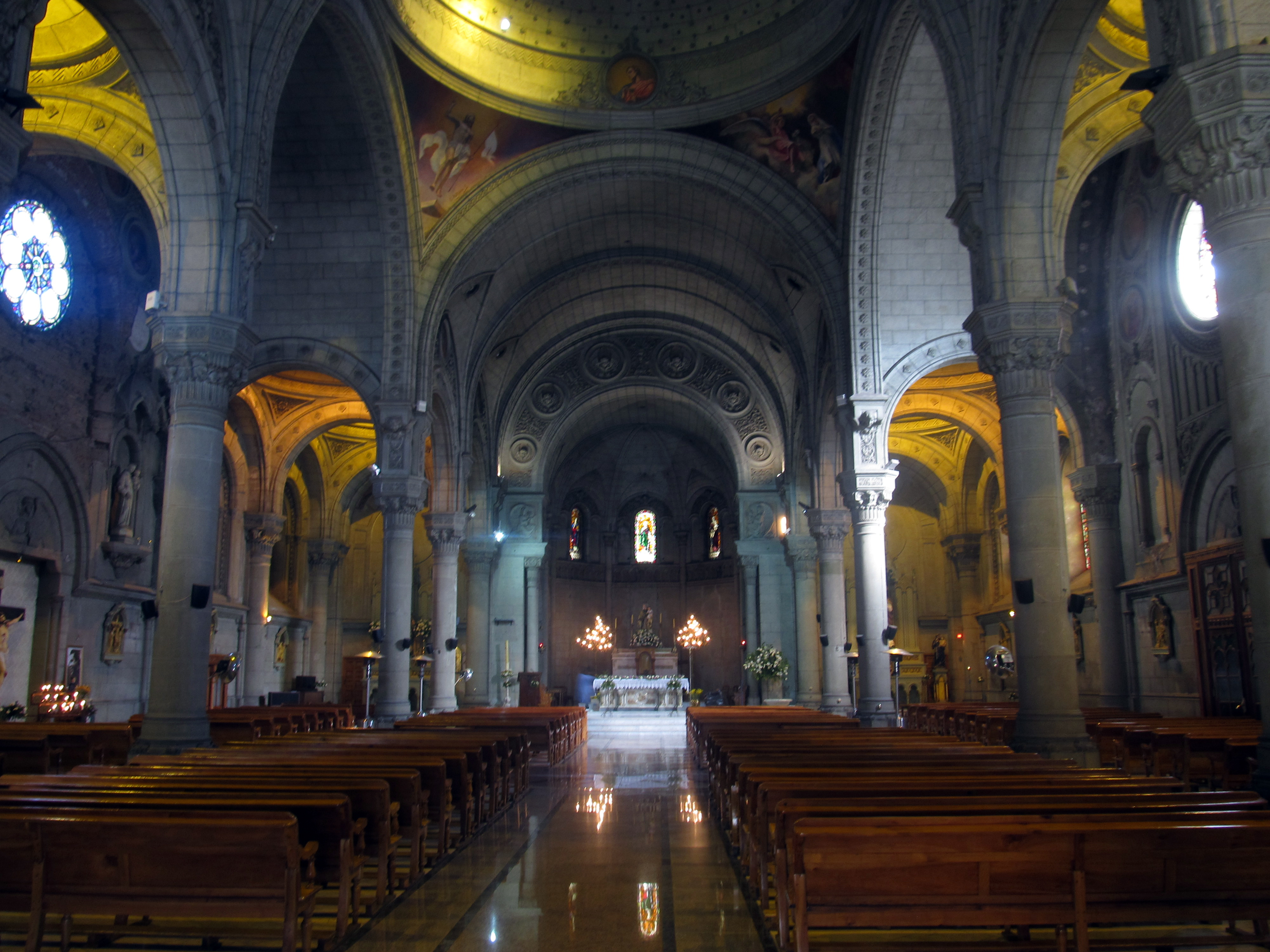 Iglesia de San Lázaro This is a photo of a national monument in Chile: 883